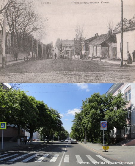 Беларуская (тарашкевіца): г.Гомель. Фельдмаршальская вуліца. Сучасная вуліца Пралетарская. This is a photo of Belarusian heritage monument. Reference number: 313Г000056 ( WLM)